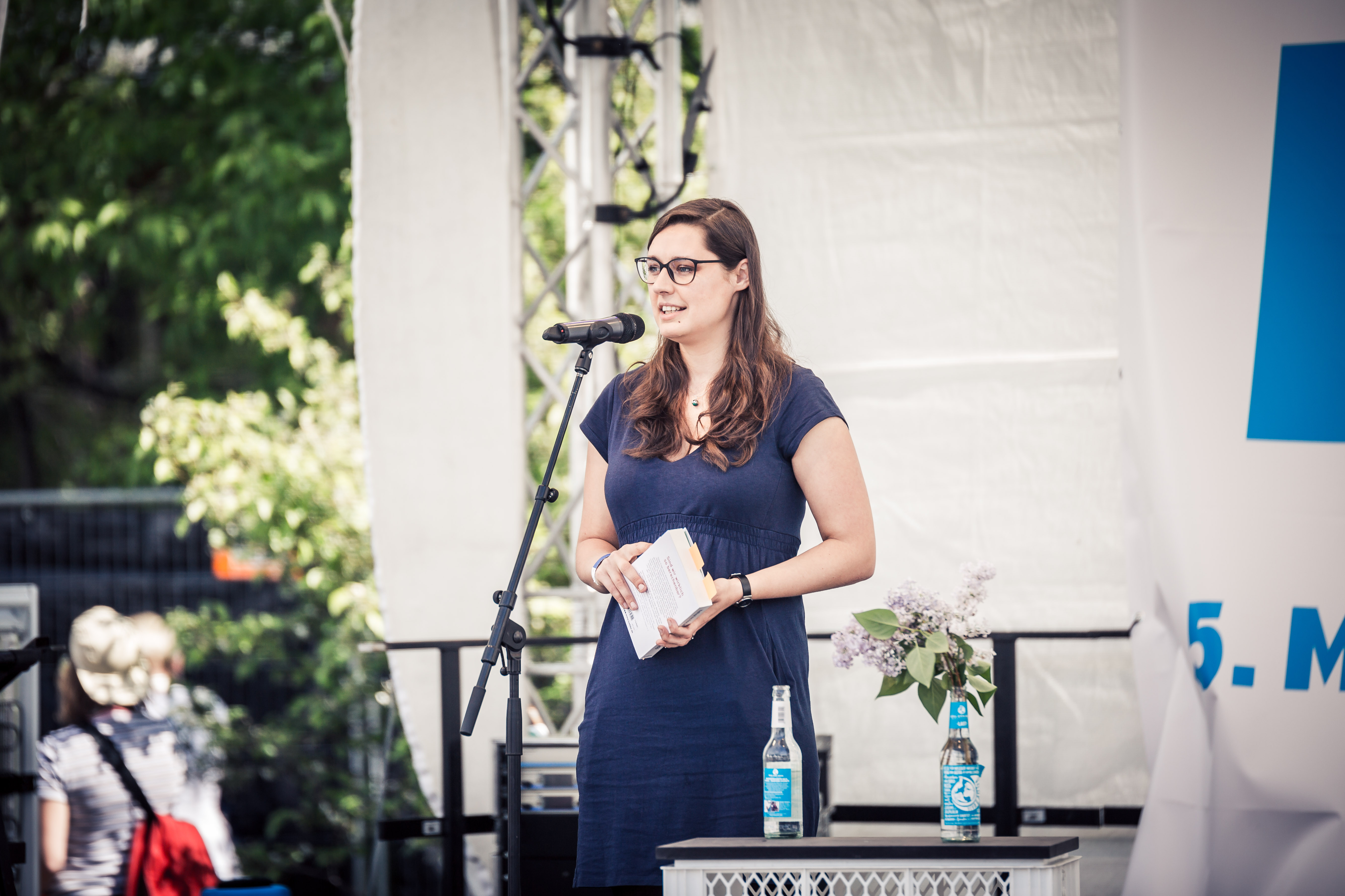 05.05.2018, Berlin: Die Daten die ich rief - Katharina Nocun. Netzfest - Veranstaltung der re:publica. Die re:publica ist eine der weltweit wichtigsten Konferenzen zu den Themen der digitalen Gesellschaft und fand in diesem Jahr vom 02. bis 04. Mai in der STATION-Berlin statt. Foto: Daniel Großjohann/re:publica